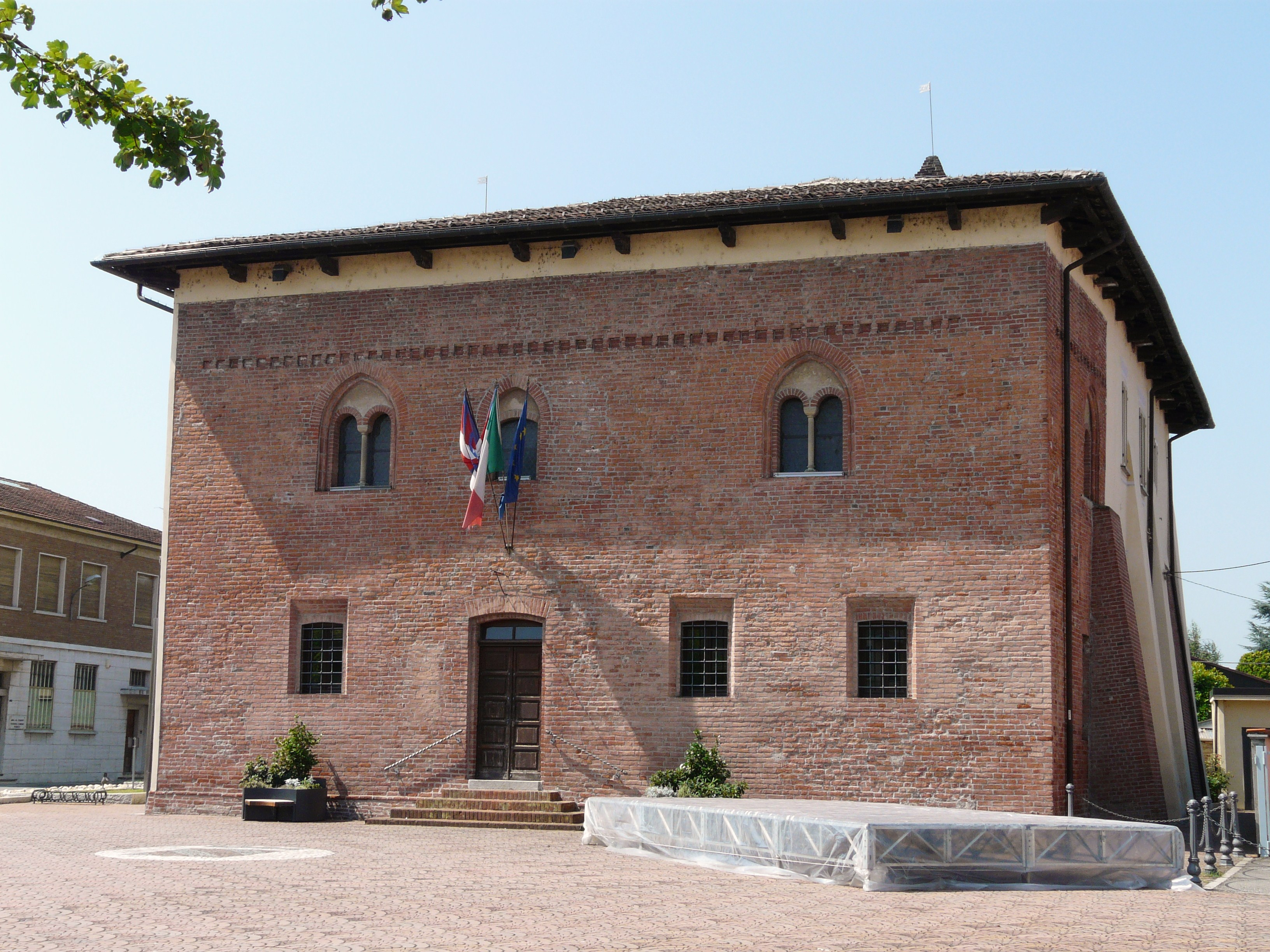 Municipio di Valmacca, Piemonte, Italia